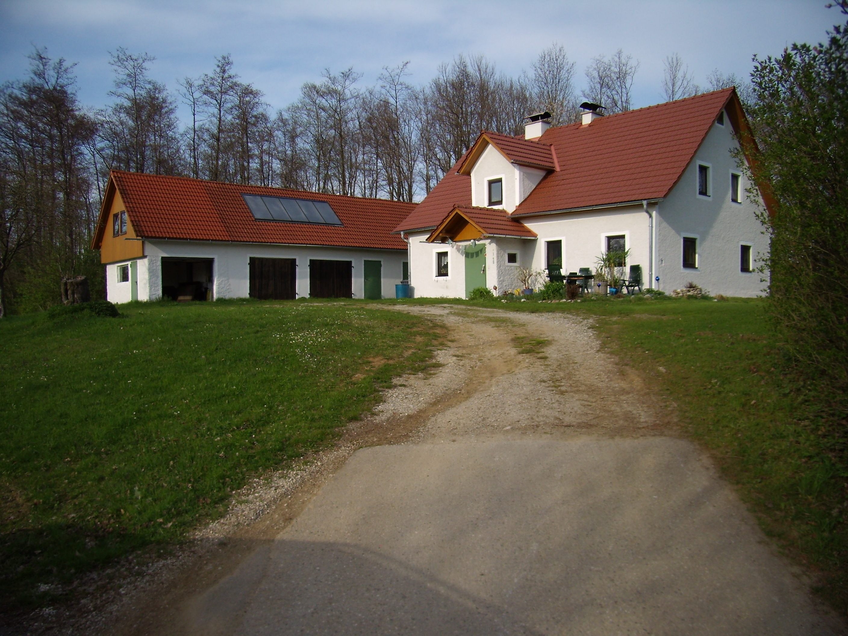 Rührndorf Nr. 41 - Überbauung von Burg Rechberg